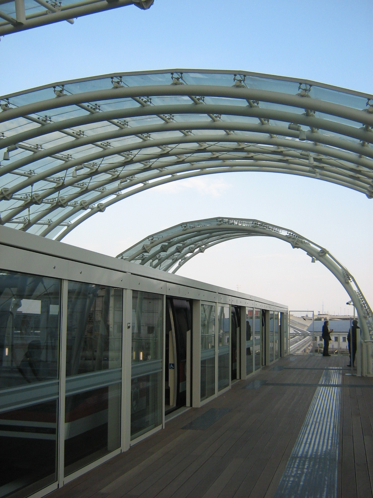 People mover alla fermata Tronchetto.